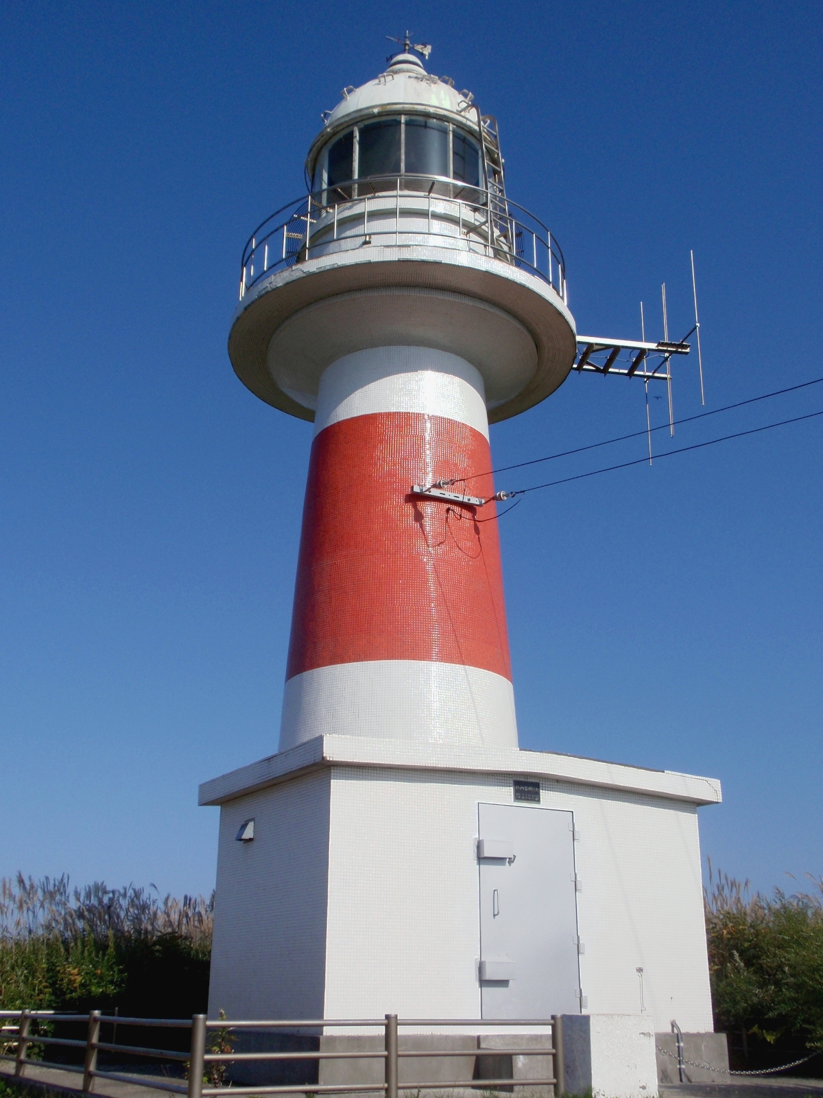 積丹出岬灯台